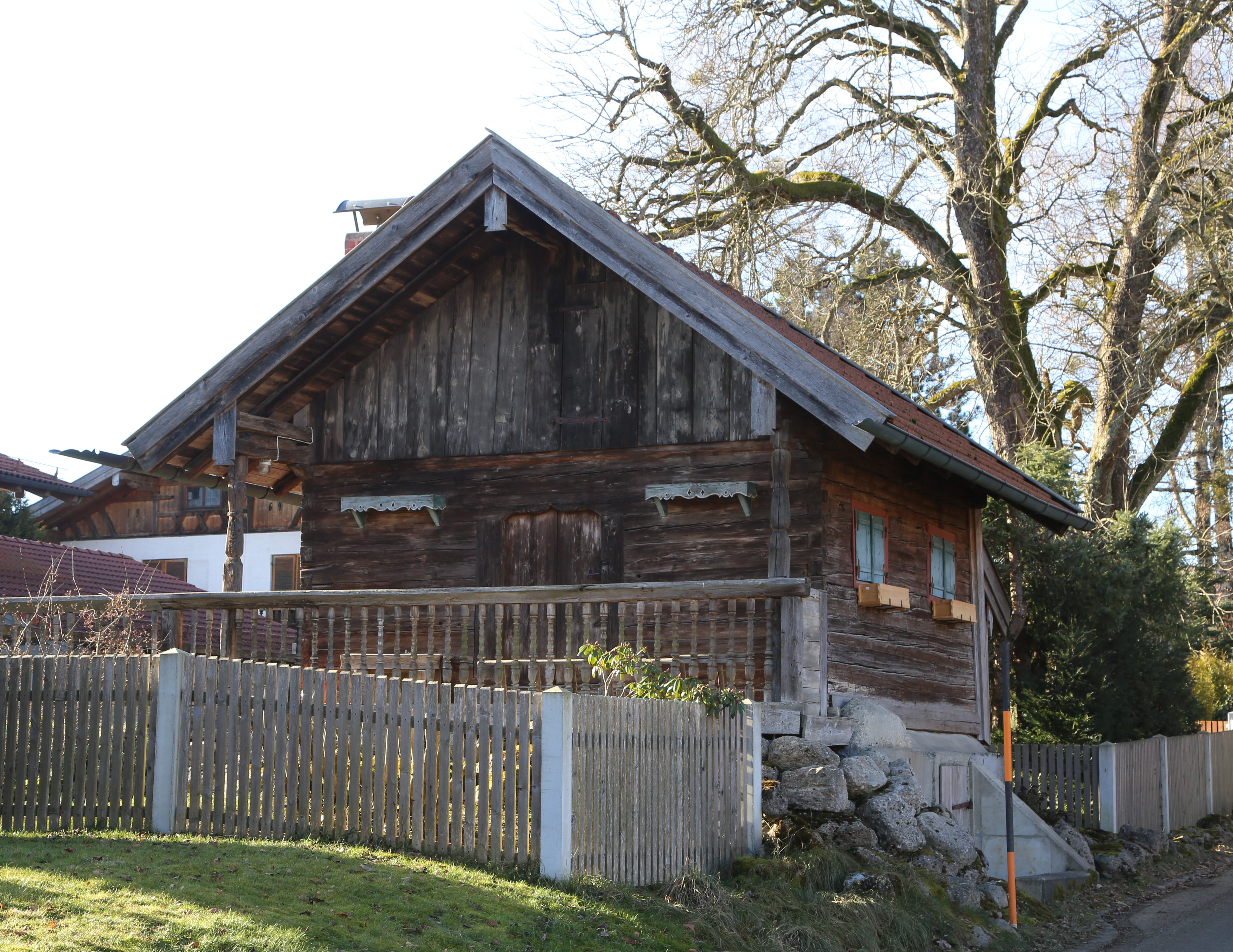 Wettlkam 27, Otterfing; ehemaliger Getreidekasten, Blockbau mit Satteldach und giebelseitiger Laube, 16. oder 17. Jahrhundert